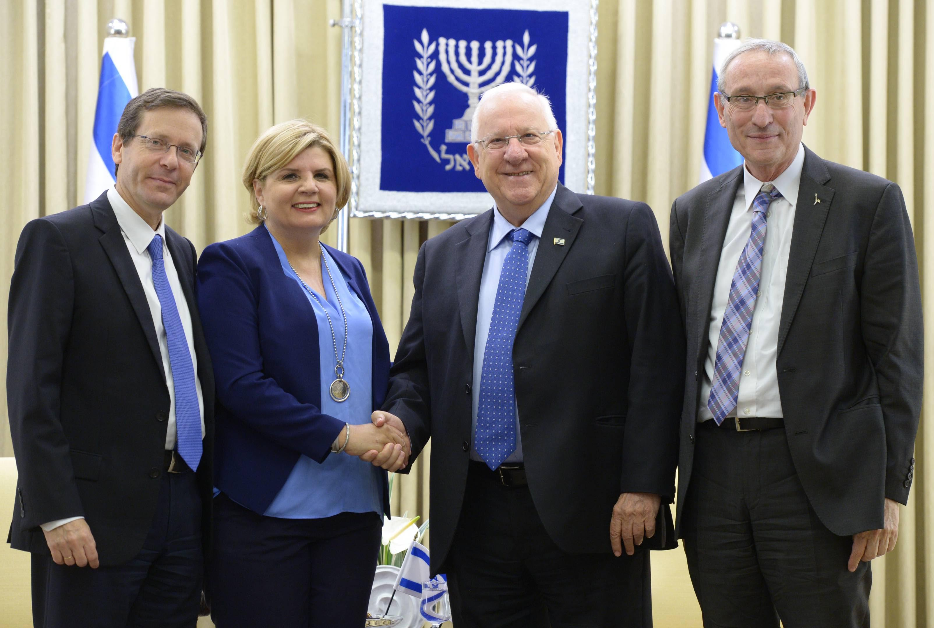 נשיא מדינת ישראל ראובן ריבלין, שני מימין מארח את אורנה ברביאי זוכת פרס "חיים הרצוג" לרגל זכייה בפרס., מימין פרופסור מנחם בן ששון, משמאל יצחק הרצוג